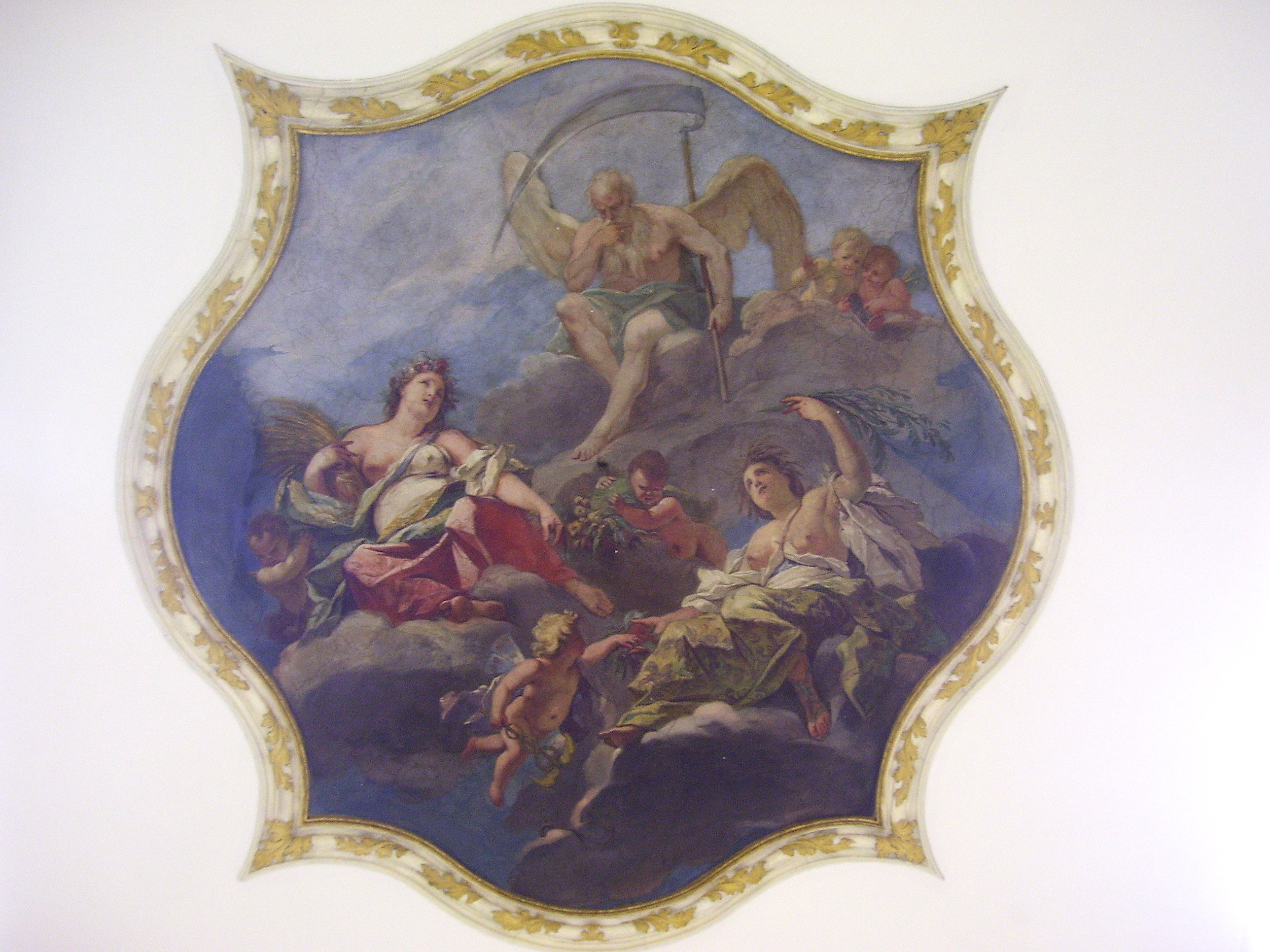 Affresco nella settecentesca Villa Pusterla (Limbiate).